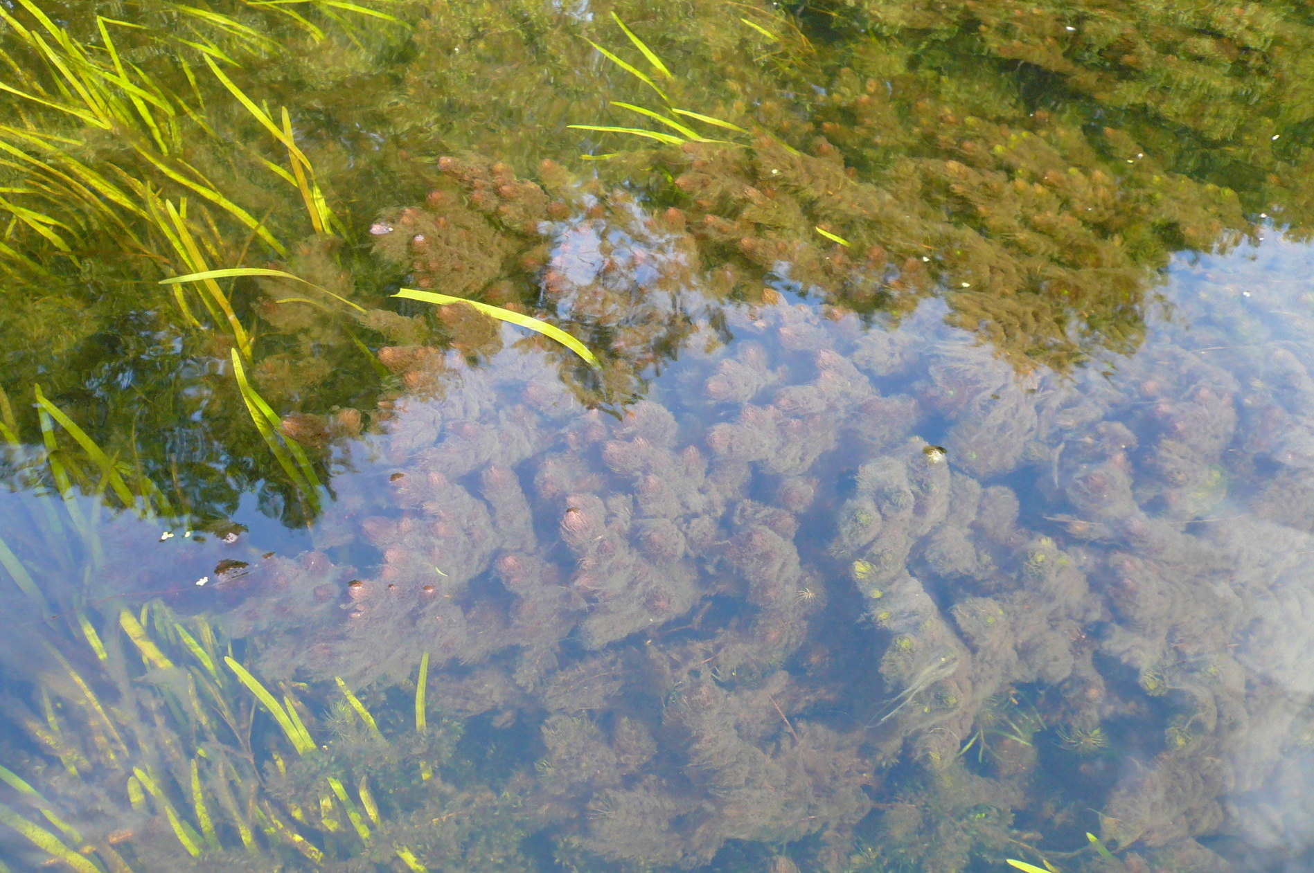 Zarośla podwodne rogatka w rzece Drawie (dopływie Noteci) w Złocieńcu